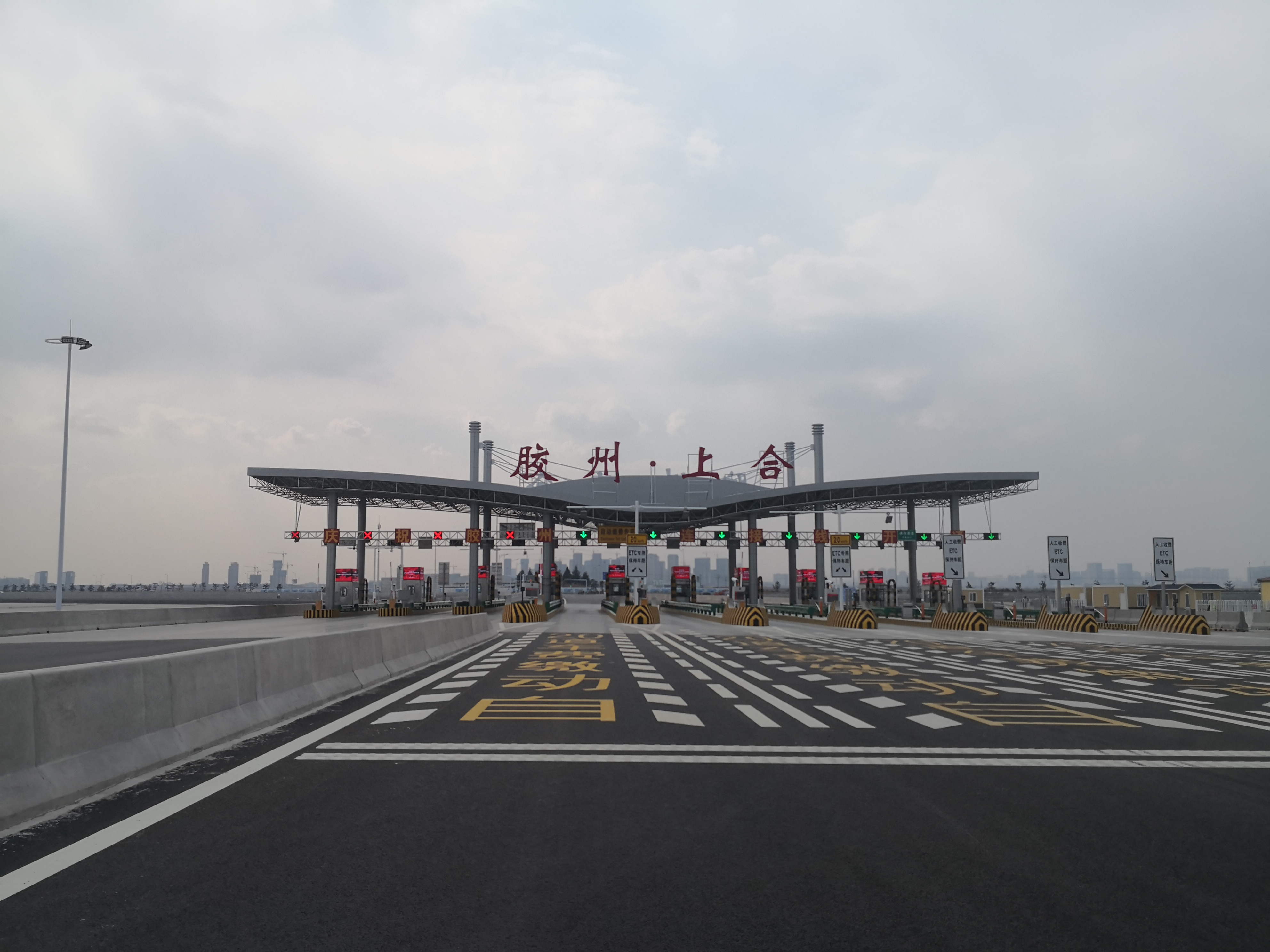 青岛胶州湾大桥胶州南（胶州·上合）收费站